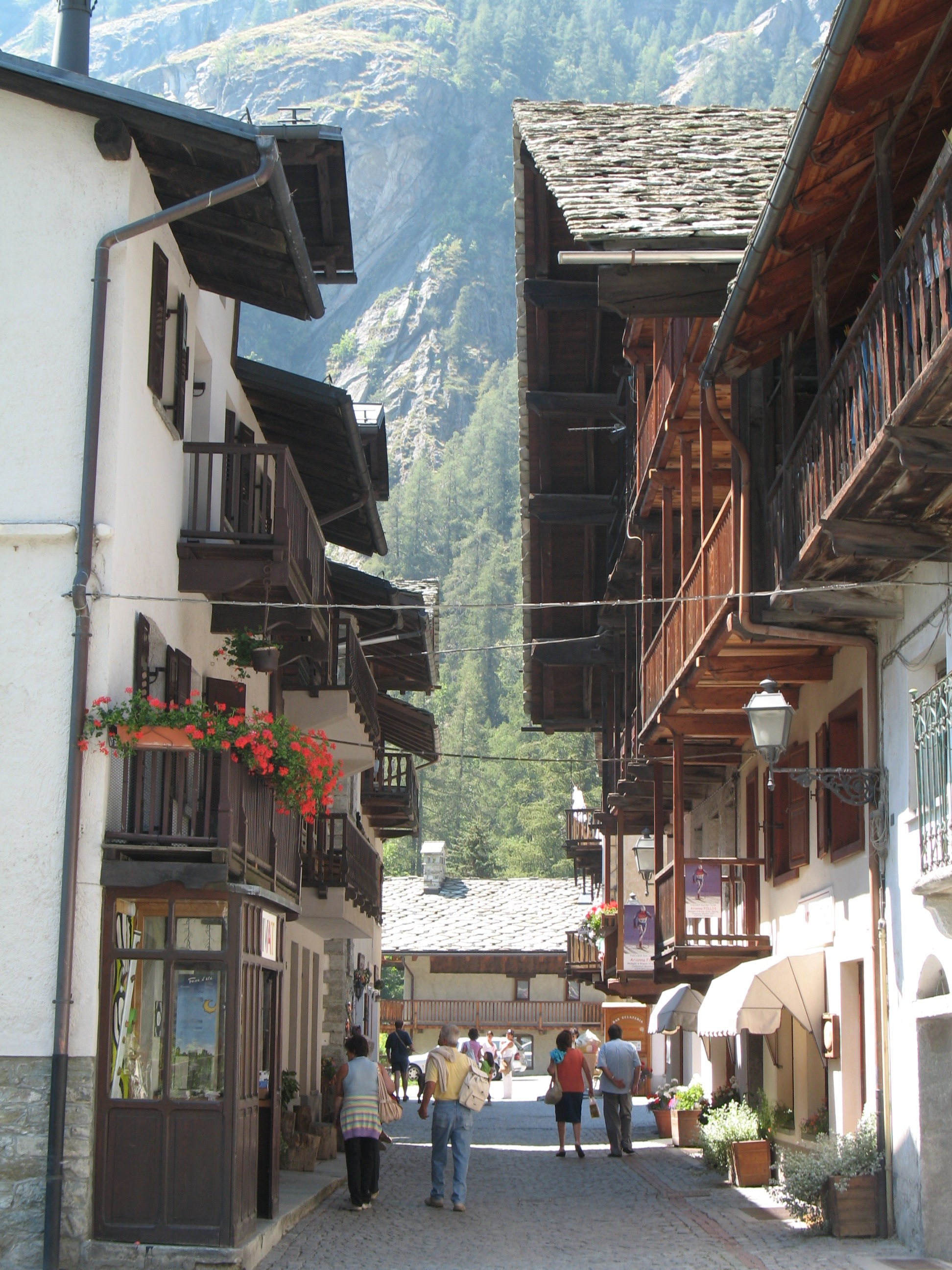 Immagine da Gressoney-Saint-Jean, Val d'Aosta